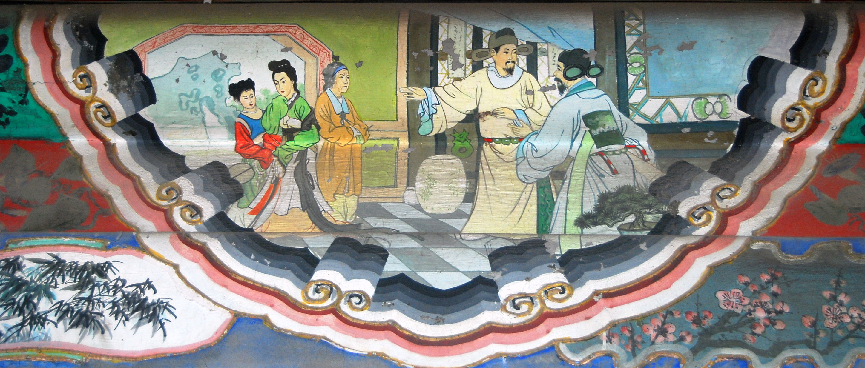 颐和园长廊彩绘：义婚孤女，《醒世恒言》故事，有京剧《二县令》